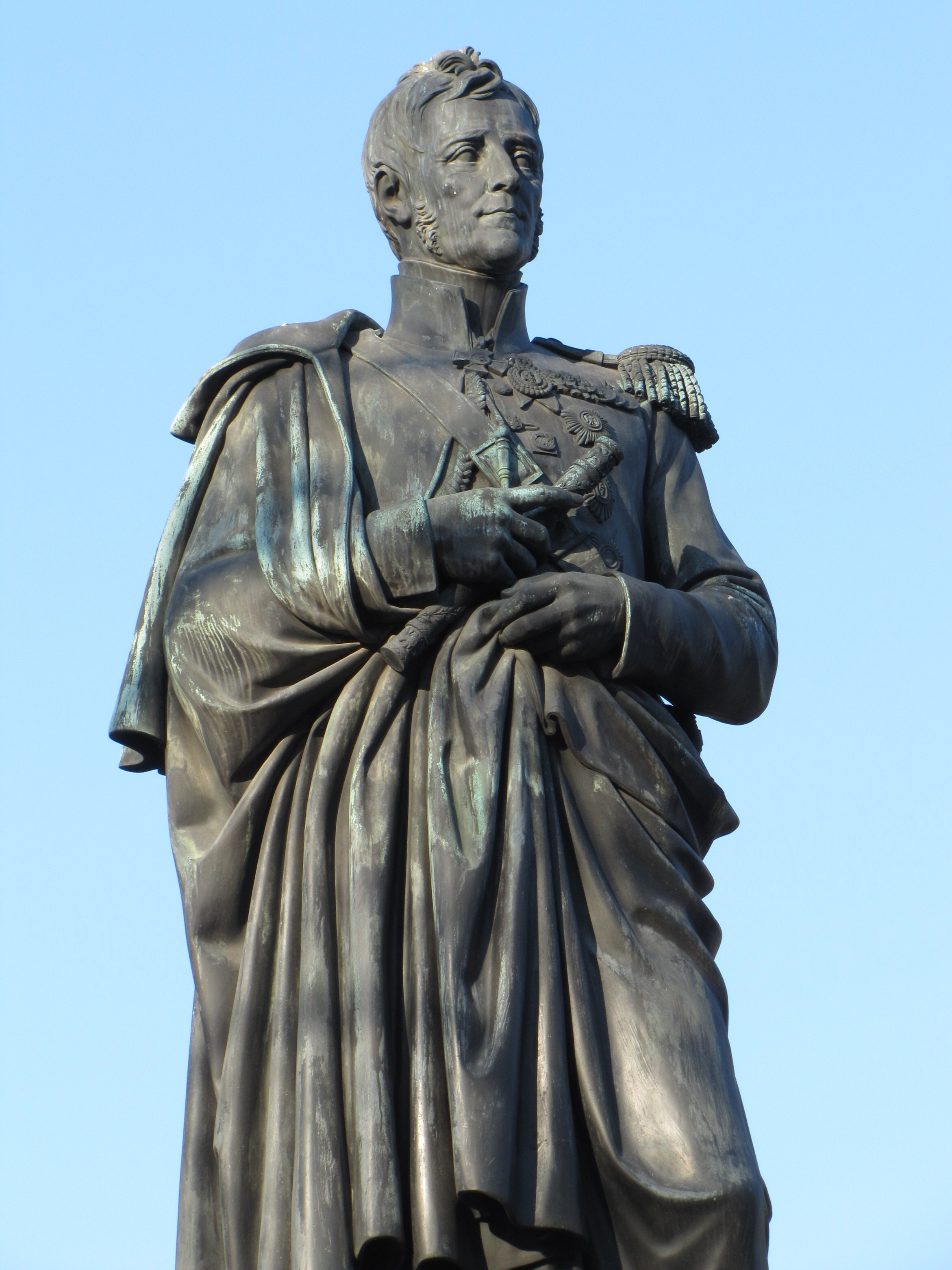 Pomník Voroncova v Oděse